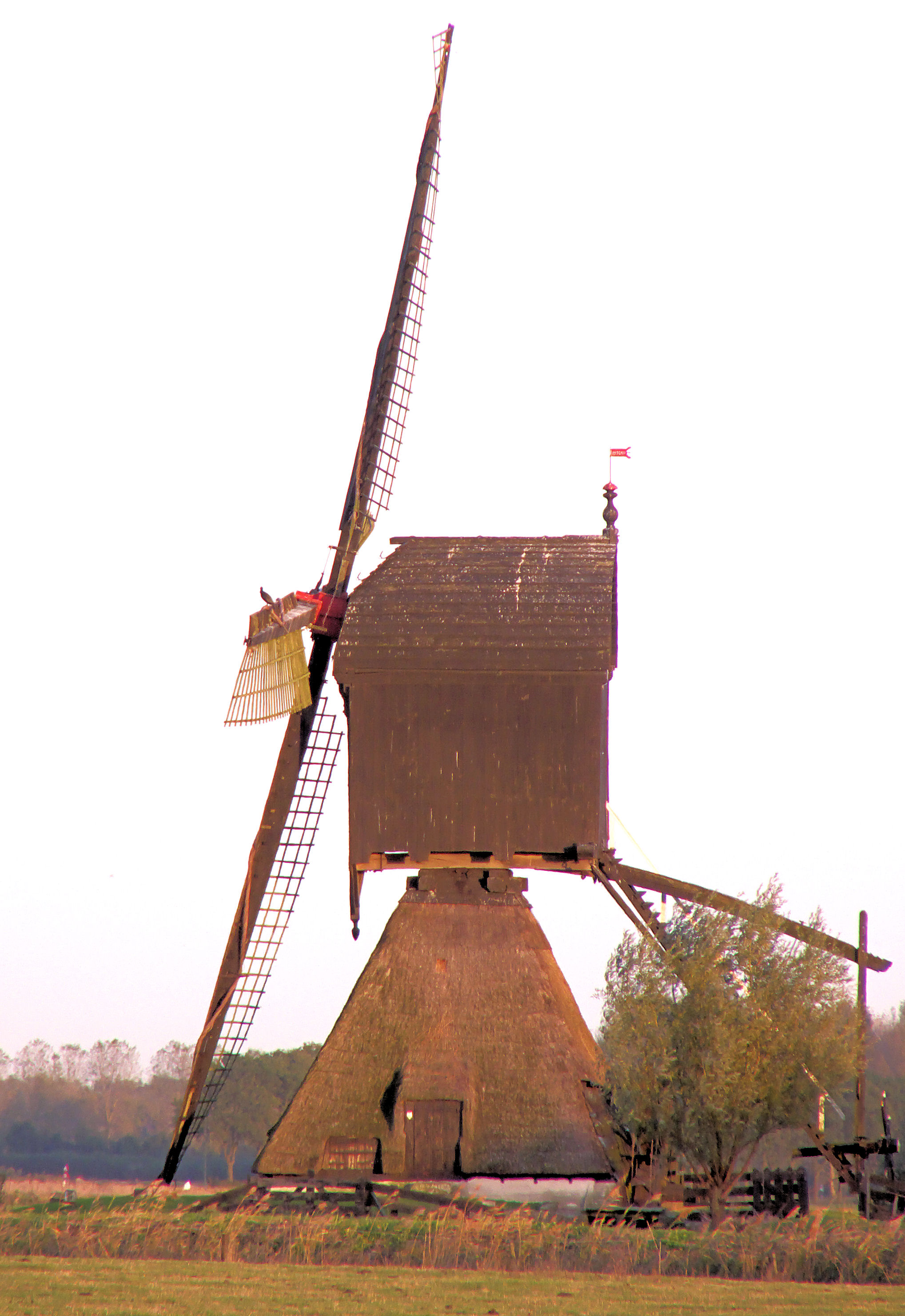 Uitwijkse molen, Uppel, Noord-Brabant